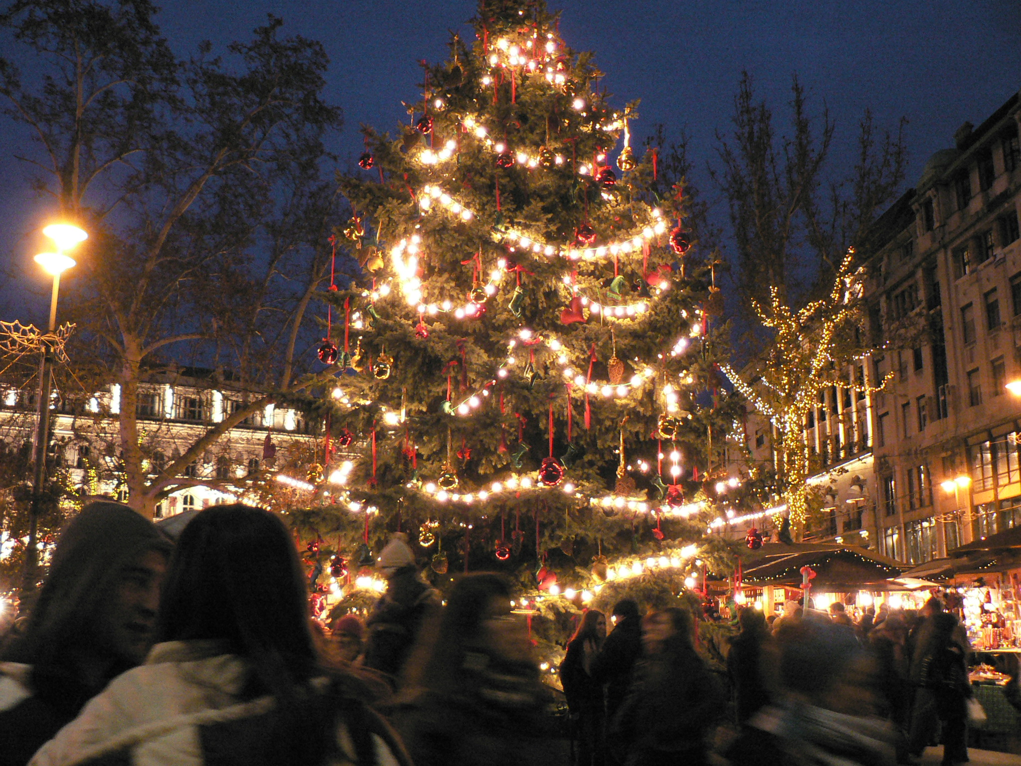 Christmas market, Budapest